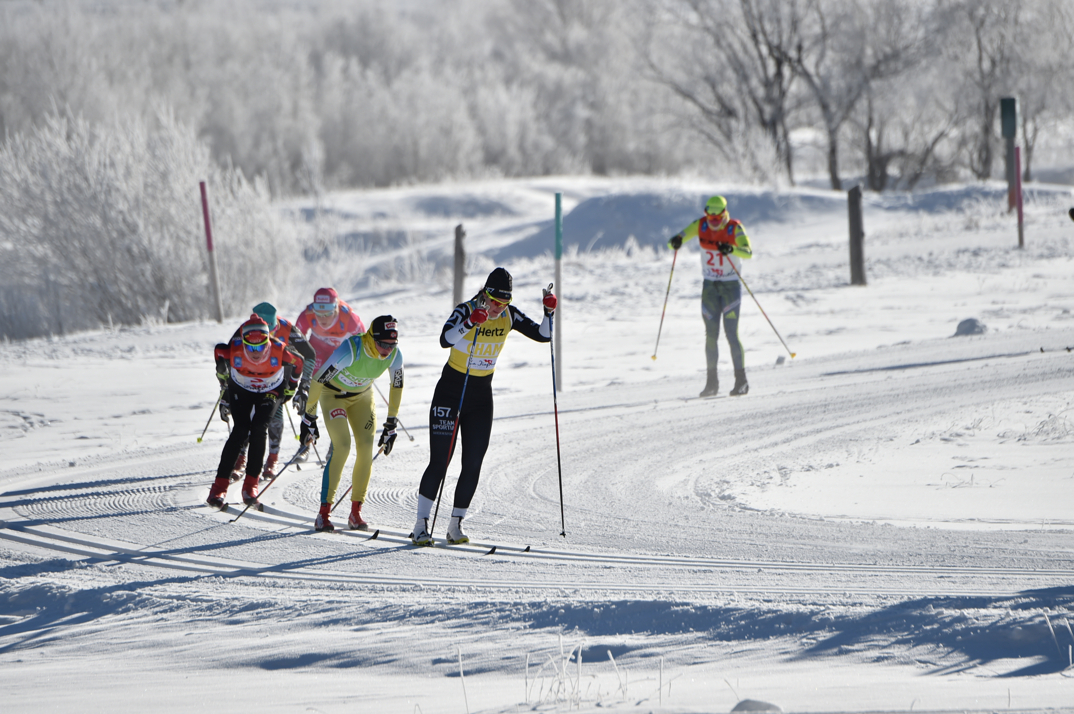 klassisches Langlaufrennnen im Engadin